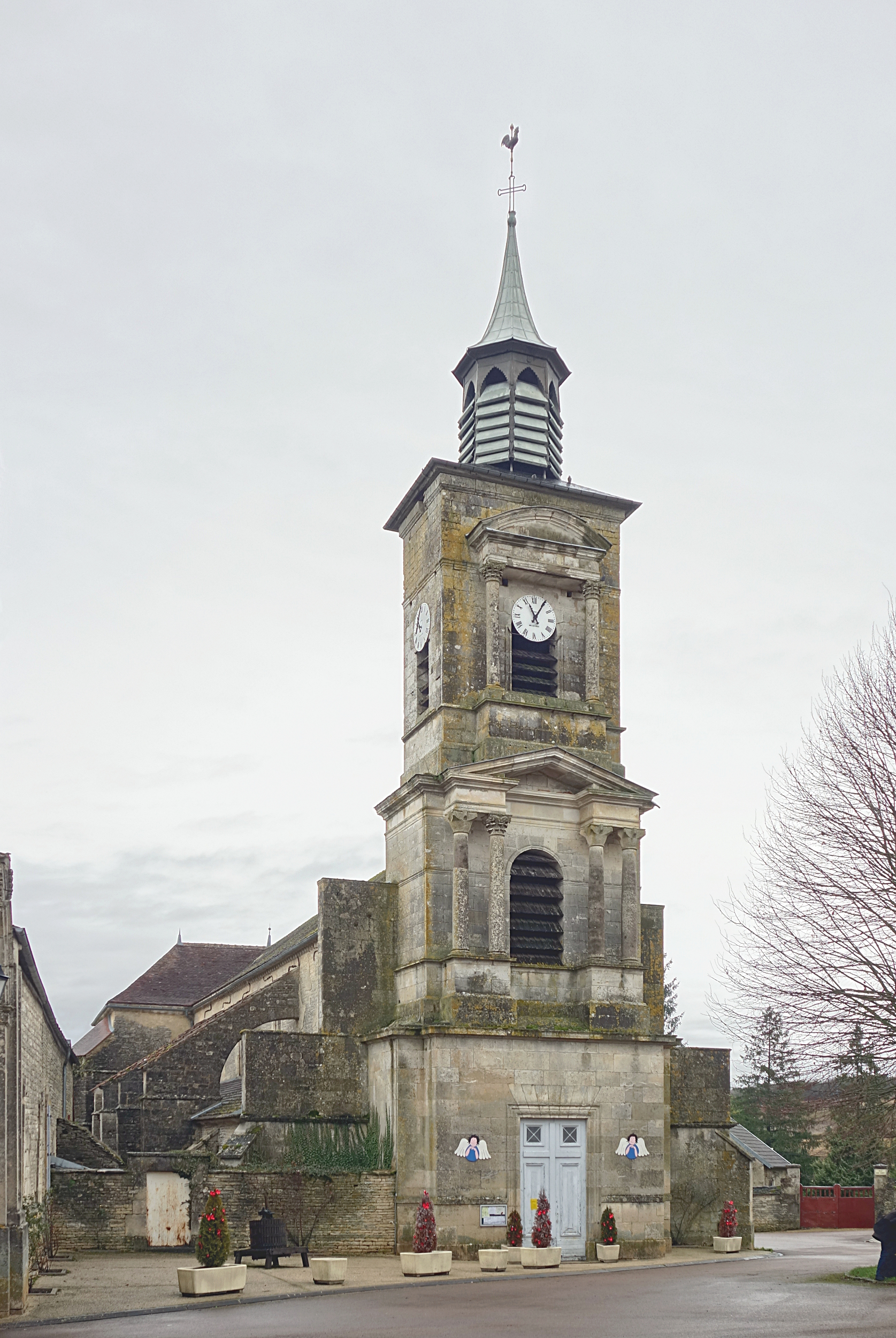 L'église Sainte-Croix de Molesme.